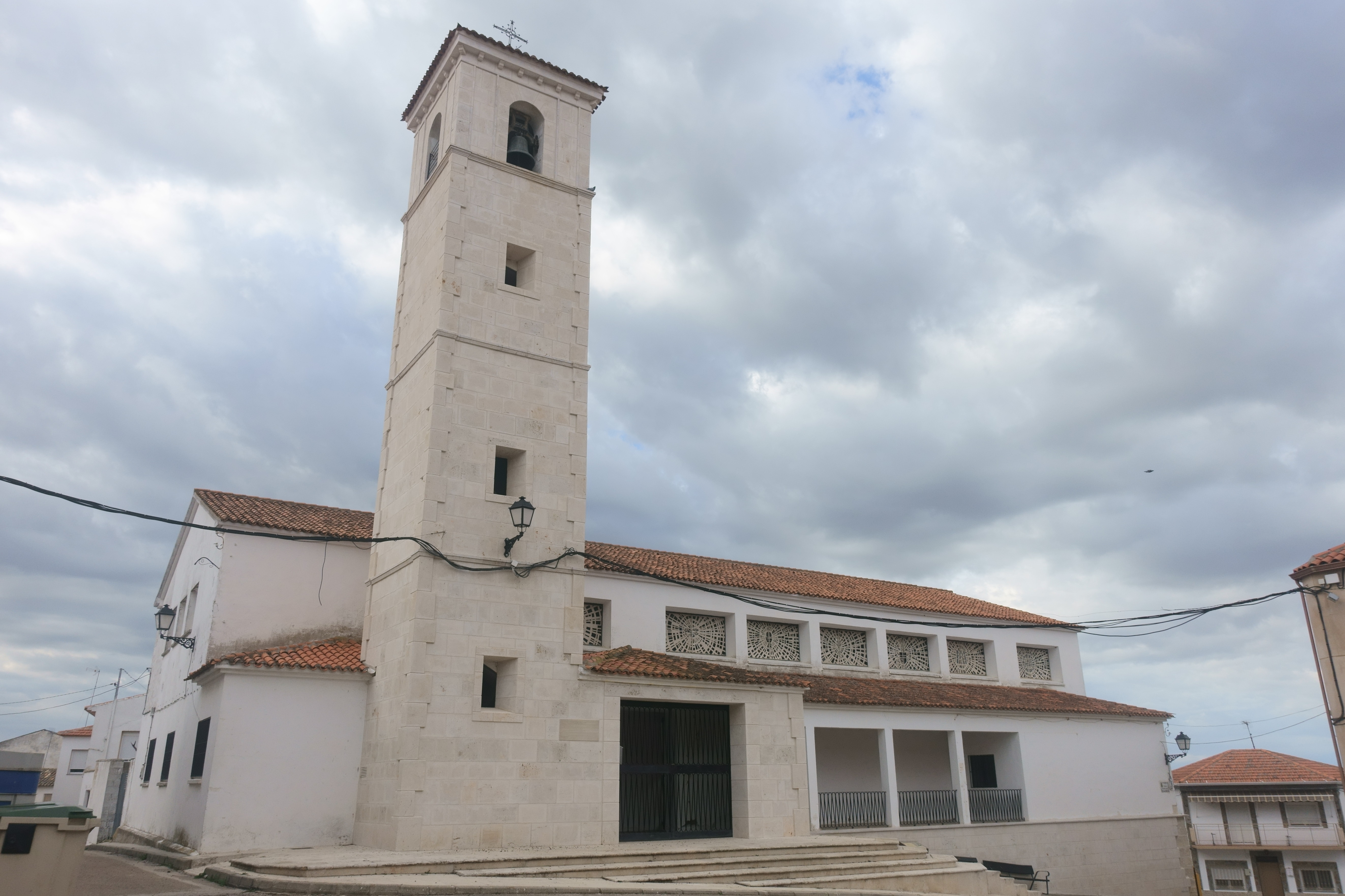 Iglesia de San Pedro Apóstol, Fuentelespino de Haro (Cuenca, España).